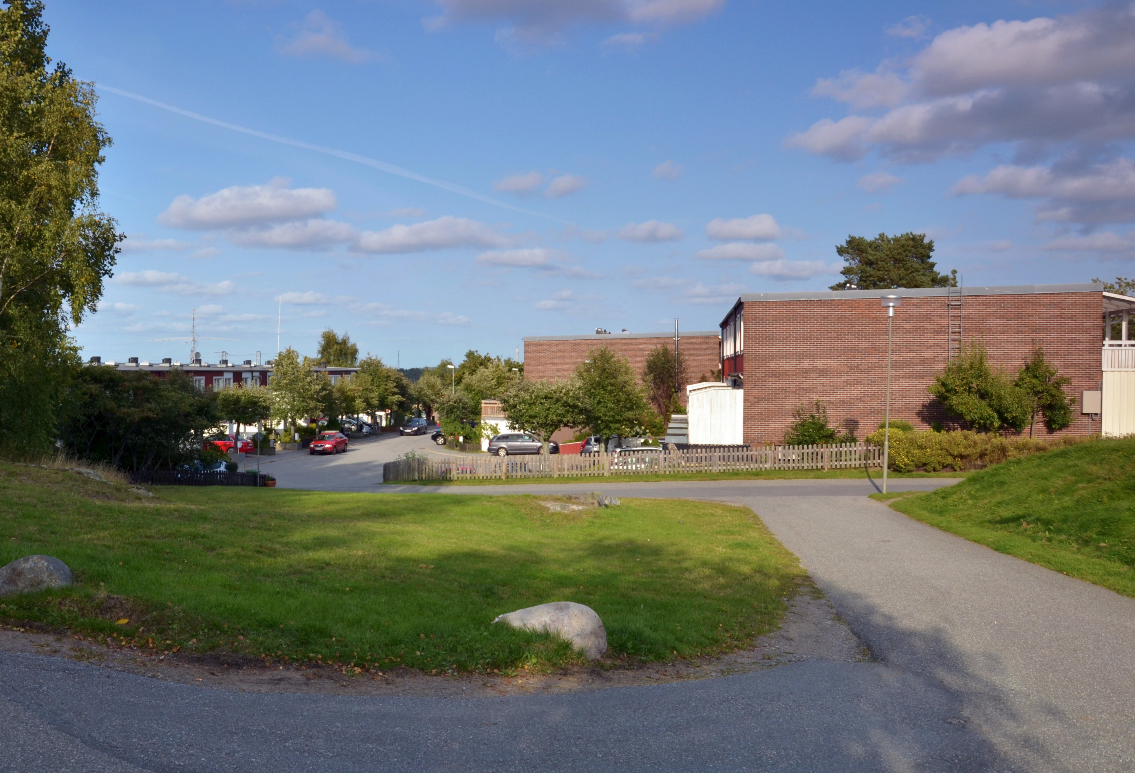 Bläcksvampsvägen i Sörskogen, Huddinge, arkitekt Gösta Nordin.